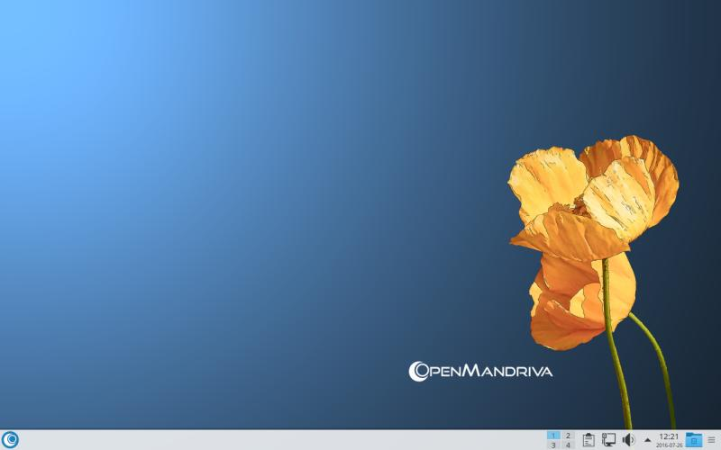 OpenMandriva Lx 3.0 Einsteinium with KDE Plasma 5 interface